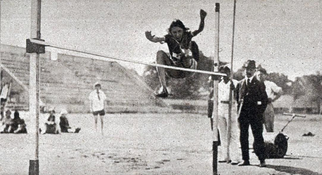 Marguerite Patouillet, de l'Olympique, championne de France du saut en hauteur en juillet 1924 (ainsi que du saut en longueur). Elle devint aussi championne de France du saut en hauteur et du saut en longueur sans élan en juillet 1925; elle occupa également le poste de gardienne de but de l'équipe de football féminine du C.A.S.G., au milieu des années 1920.